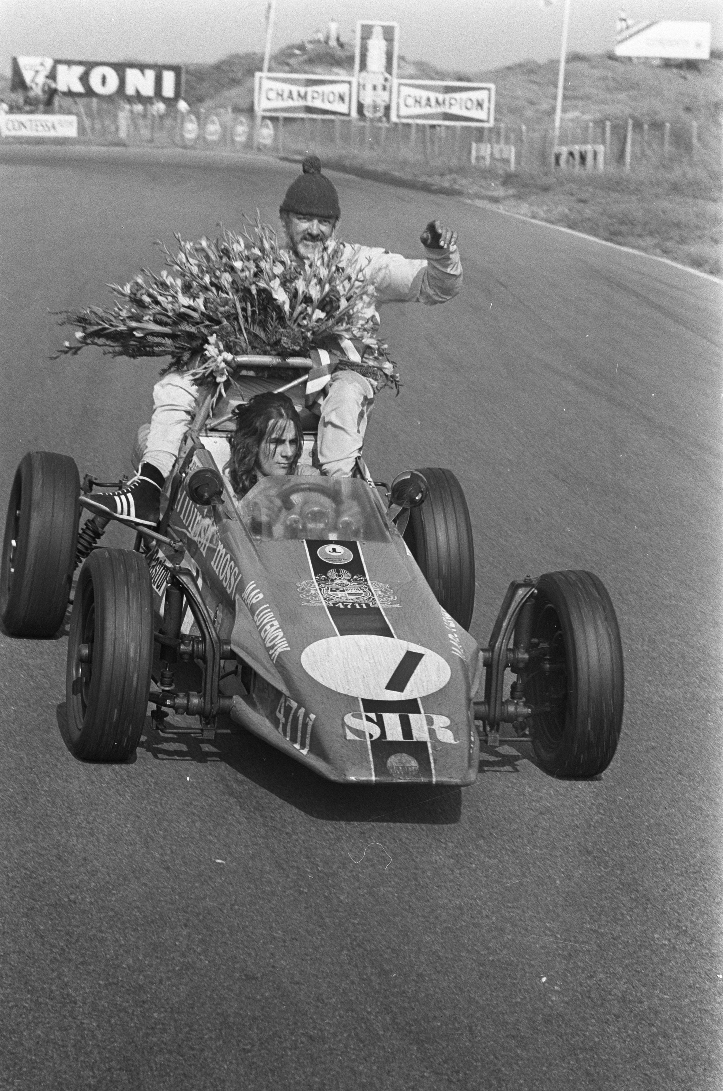 Collectie / Archief : Fotocollectie Anefo Reportage / Serie : [ onbekend ] Beschrijving : Internationale Formule Vee 1300-race op circuit van Zandvoort, huldiging Jaap Luyendijk als Europees Kampioen Datum : 6 augustus 1972 Locatie : Noord-Holland, Zandvoort Trefwoorden : autoraces, huldigingen, kampioenen Fotograaf : Evers, Joost / Anefo Auteursrechthebbende : Nationaal Archief Materiaalsoort : Negatief (zwart/wit) Nummer archiefinventaris : bekijk toegang 2.24.01.05 Bestanddeelnummer : 925-7913